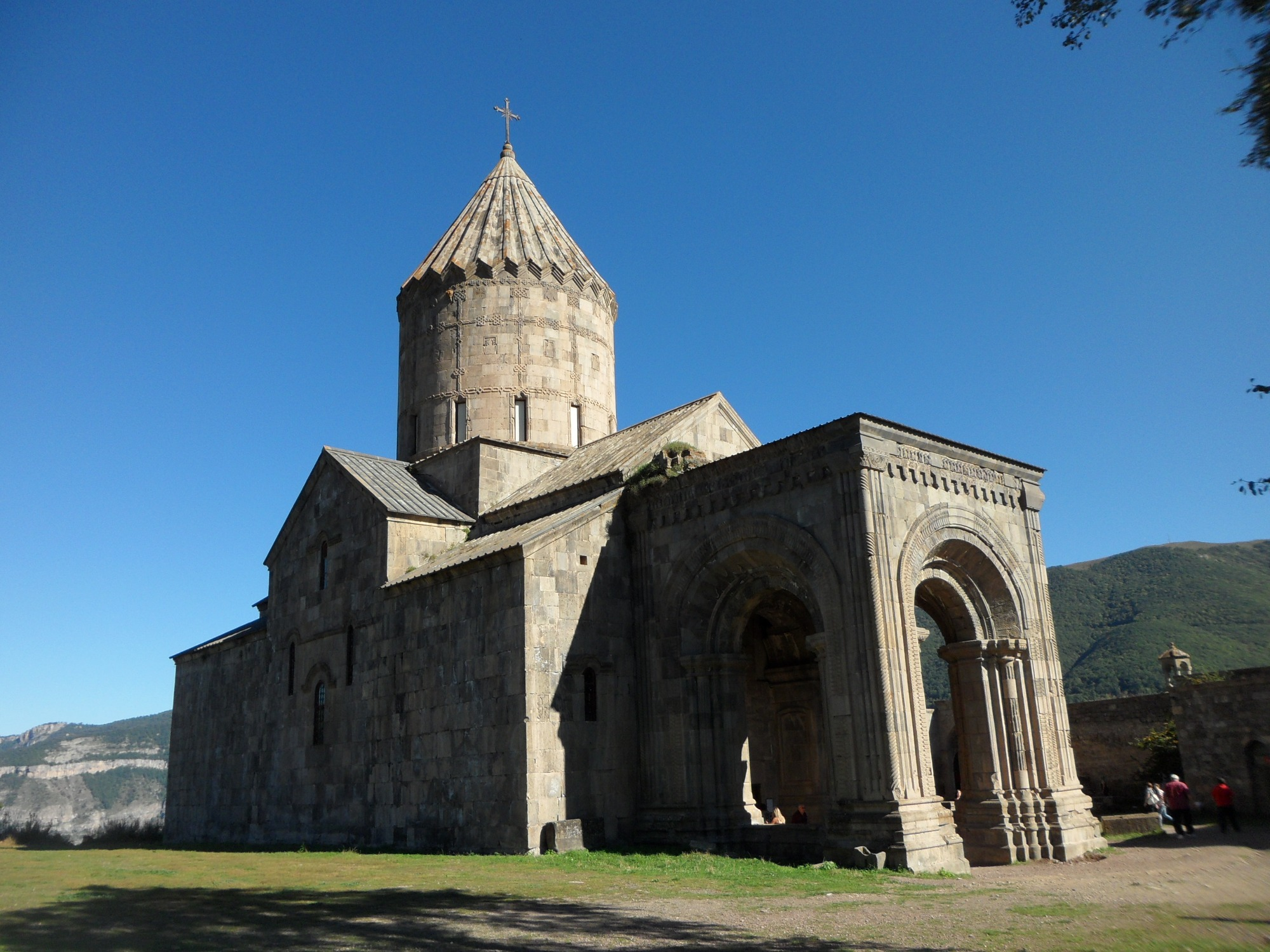 Saint Poghos-Petros Church, Tatev Monastery 97/9.11 97/9.12